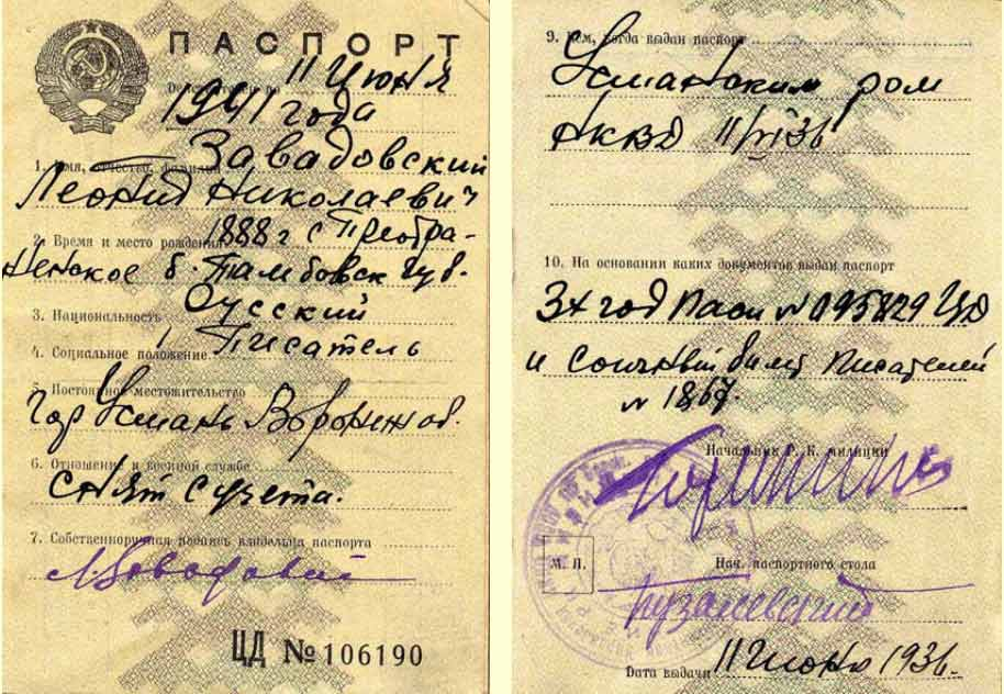 Фотокопия советского паспорта, выписанная писателю Леониду Николаевичу Завадовскому 11 июня 1936 г.